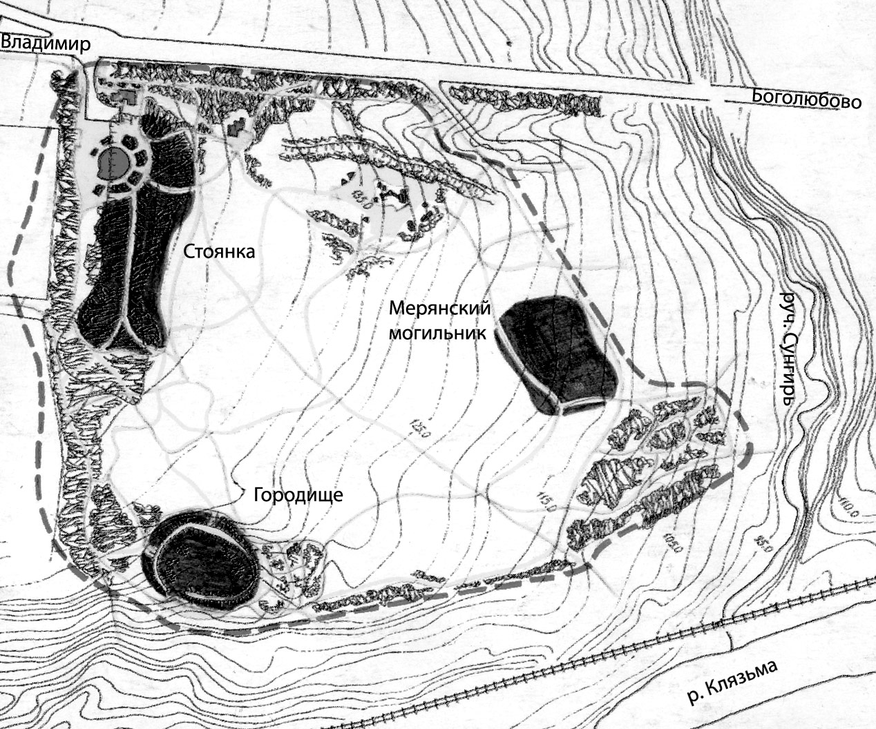 Схема: Сунгирь, палеолитической стоянки древнего человека на территории Владимирской области